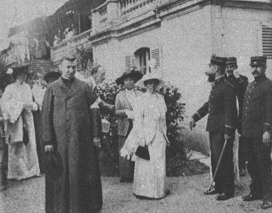 la_reine_de_madagascar_Ranavalo visitant les blessés de la Grande Guerre sur le sol métropolitain.